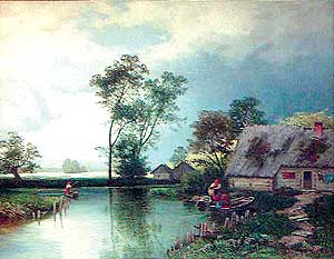 Nach dem Regen, Ölgemälde um 1870